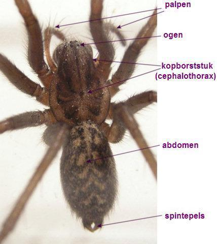 Eigen foto e van herk 2004